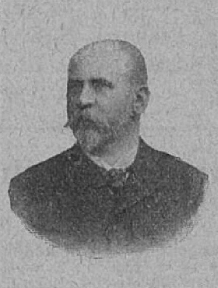 Václav Šulc (1837-1926), český statkář a politik